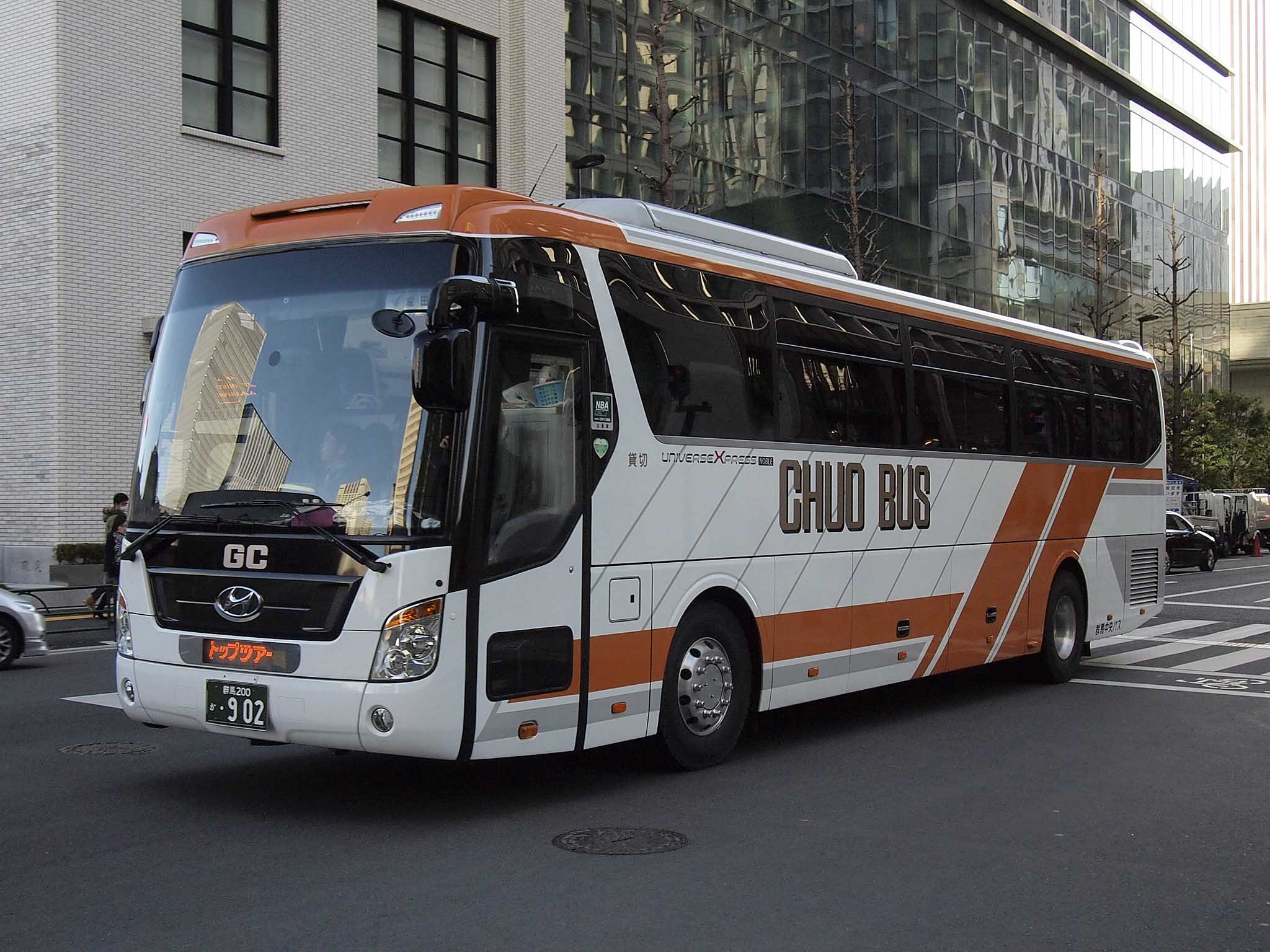 群馬中央バスのヒュンダイ・ユニバース。 登録番号：群馬200か・902 撮影地：東京都千代田区丸の内